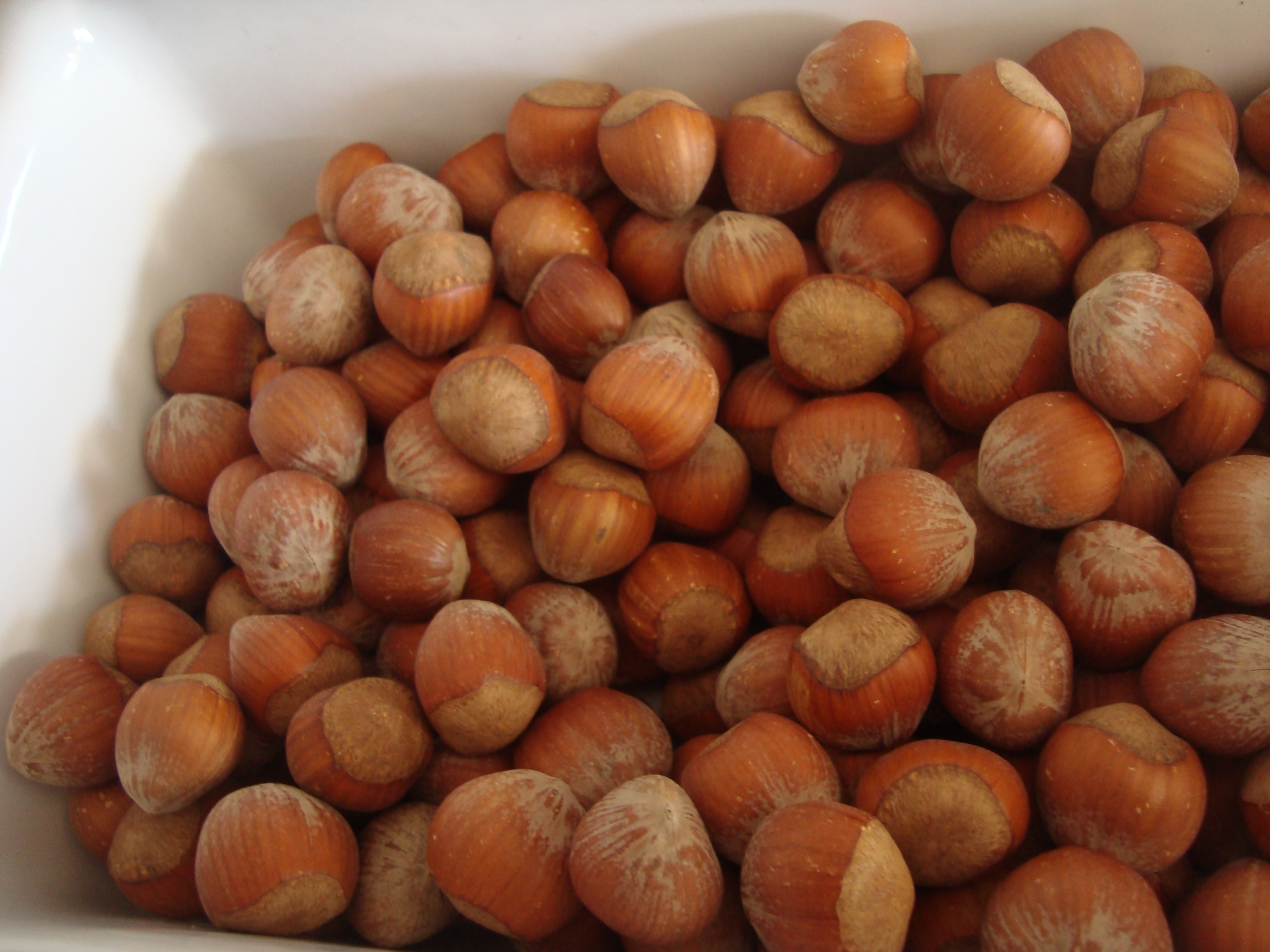 Avellanes de Benasal